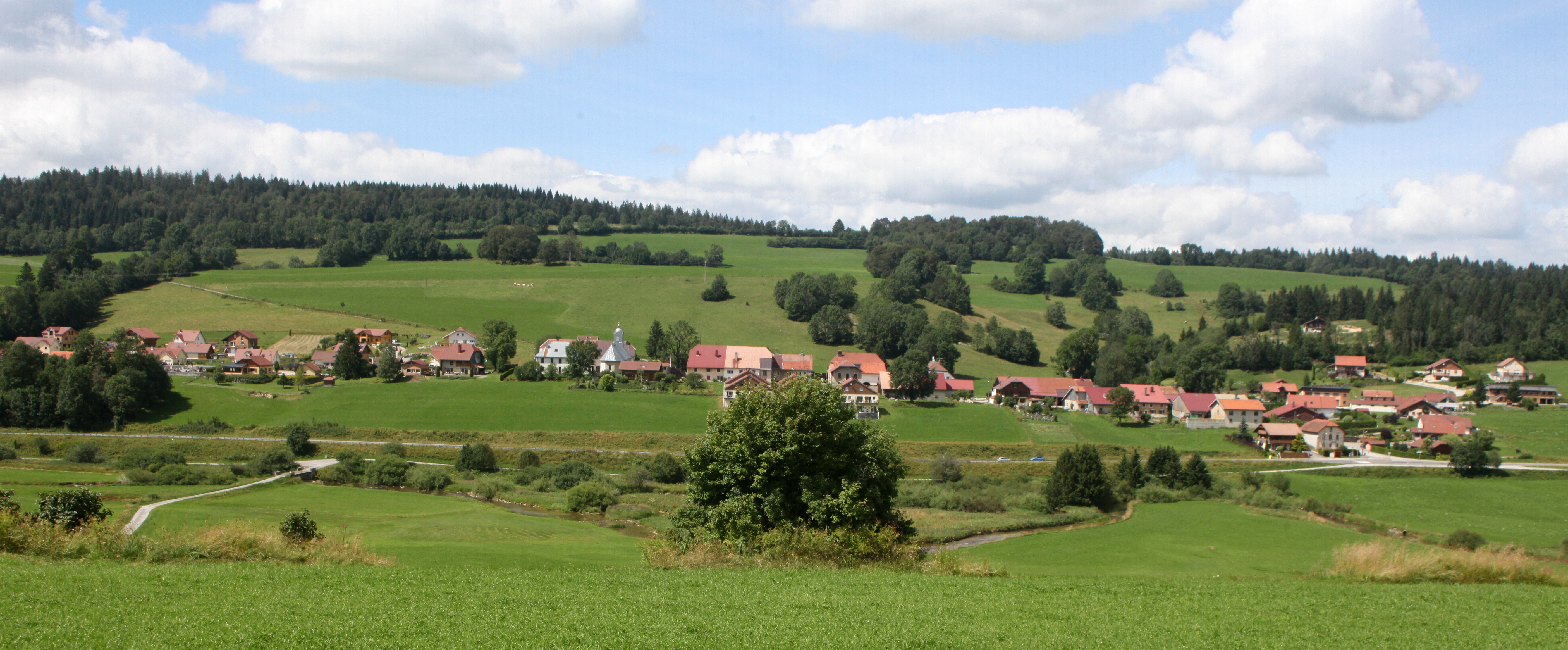 Vue de Sarrageois (Doubs).